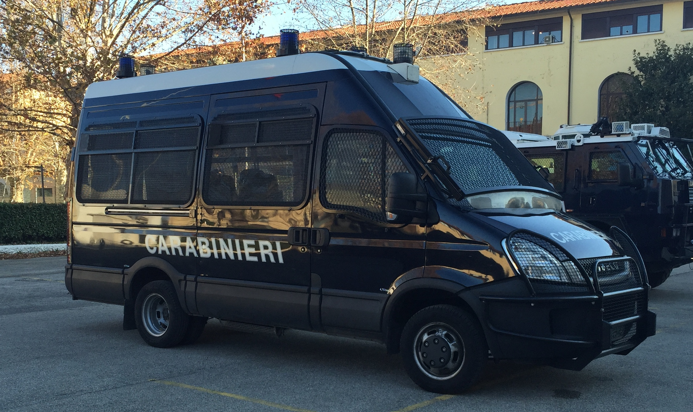 Un Iveco C-17 dell'Arma dei Carabinieri - Lato/fronte